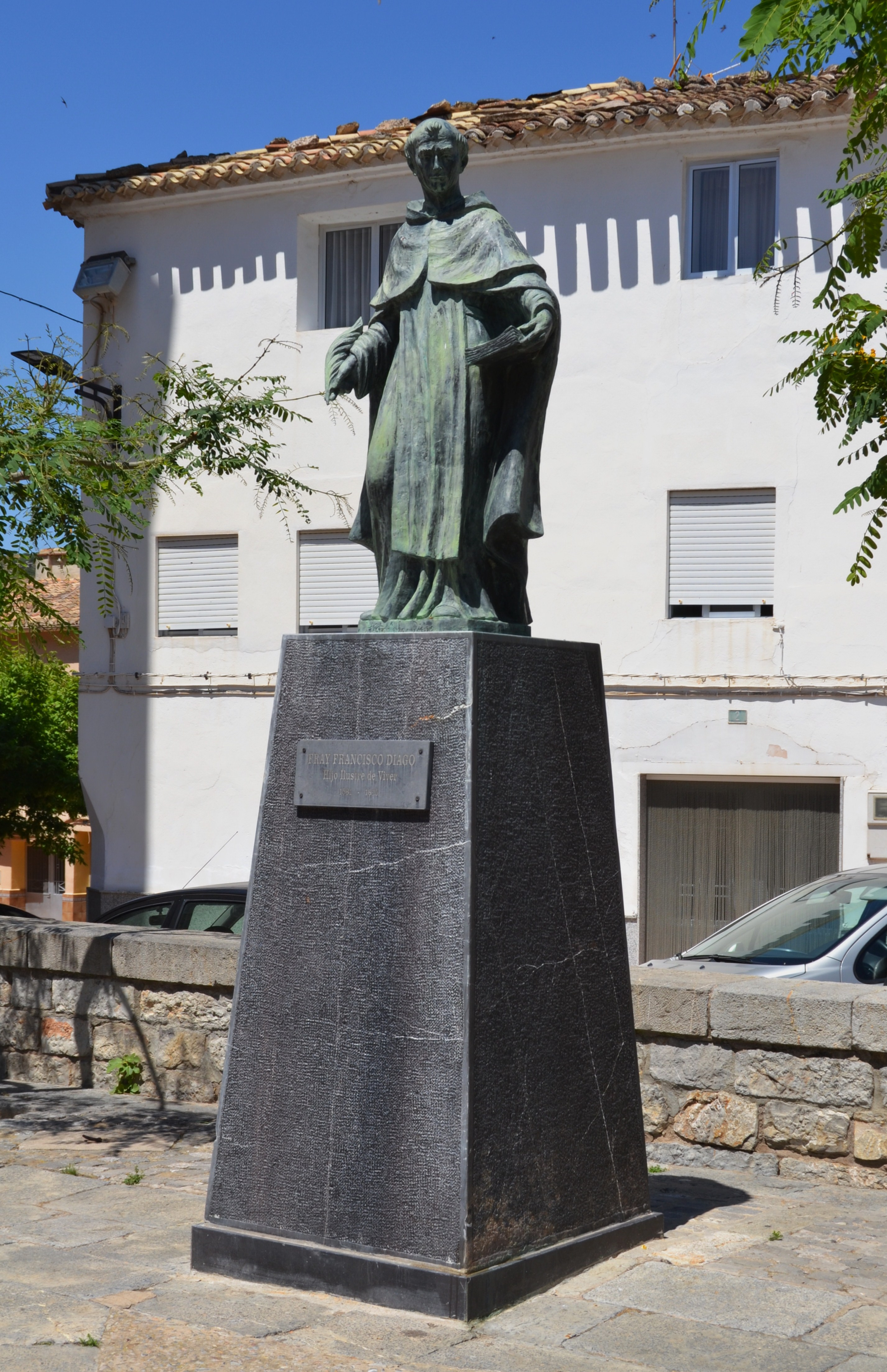 Estàtua de l'historiador Diago a Viver.